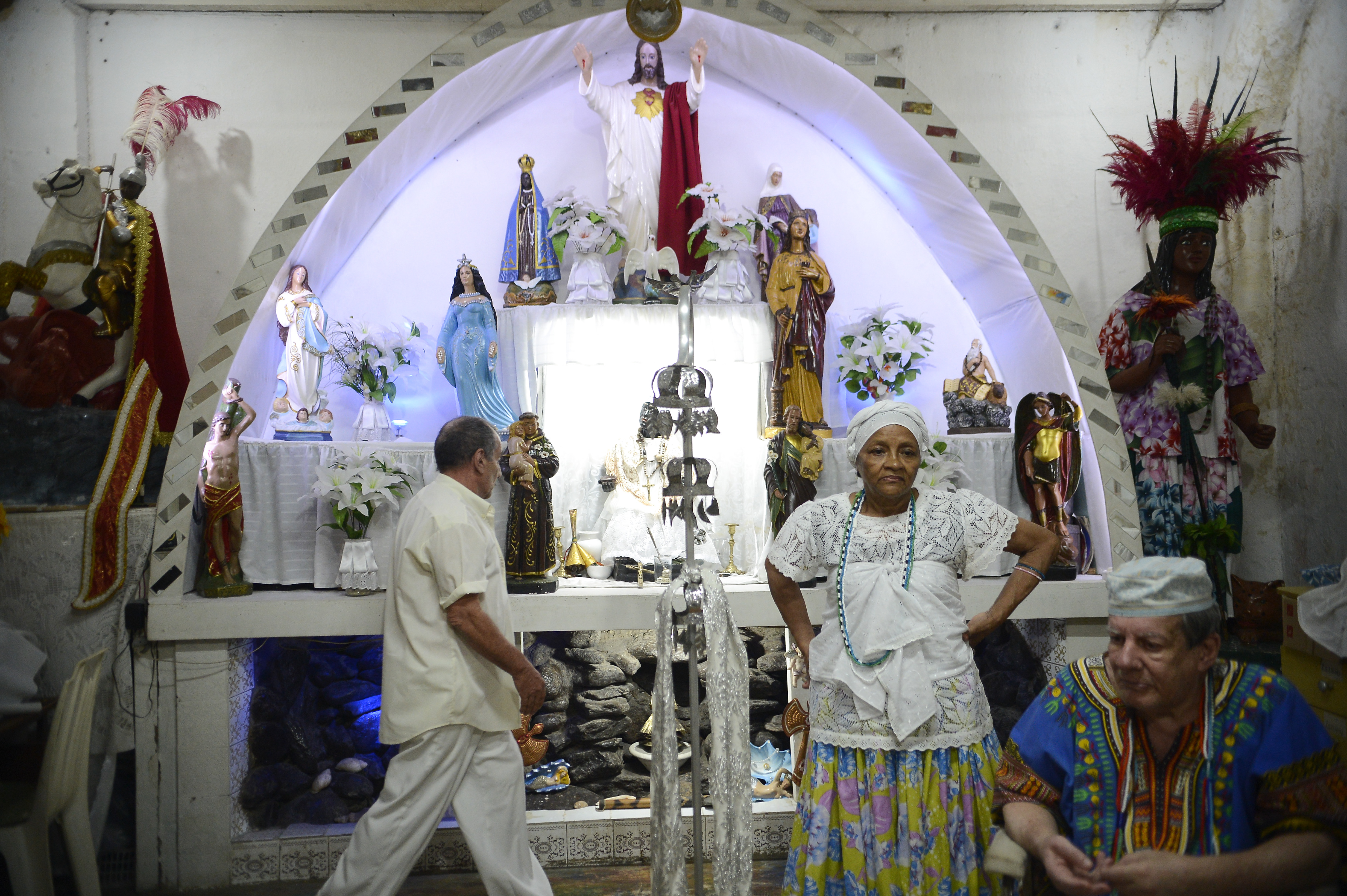 Rio de Janeiro - Tenda Espírita Vovó Maria Conga de Aruanda, no Estácio, que foi a primeira instituição cadastrada no mapa de terreiros de Ubanda da cidade do Rio de Janeiro (Tânia Rêgo/Agência Brasil)